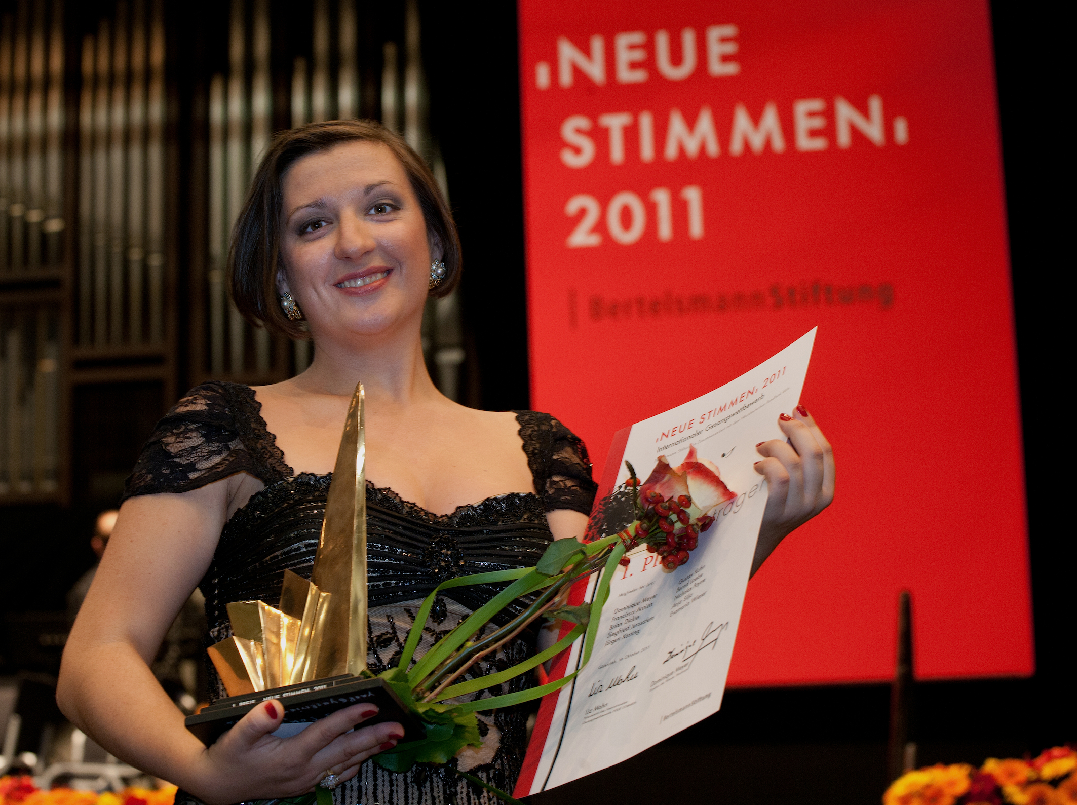 Finalkonzert